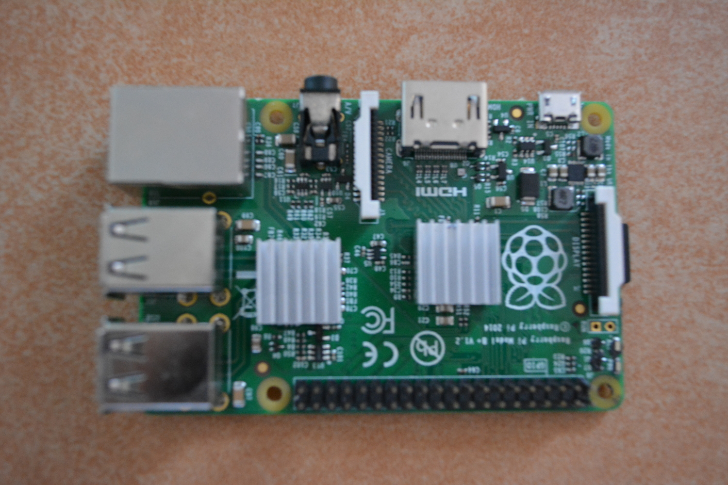 Raspberry Pi B+